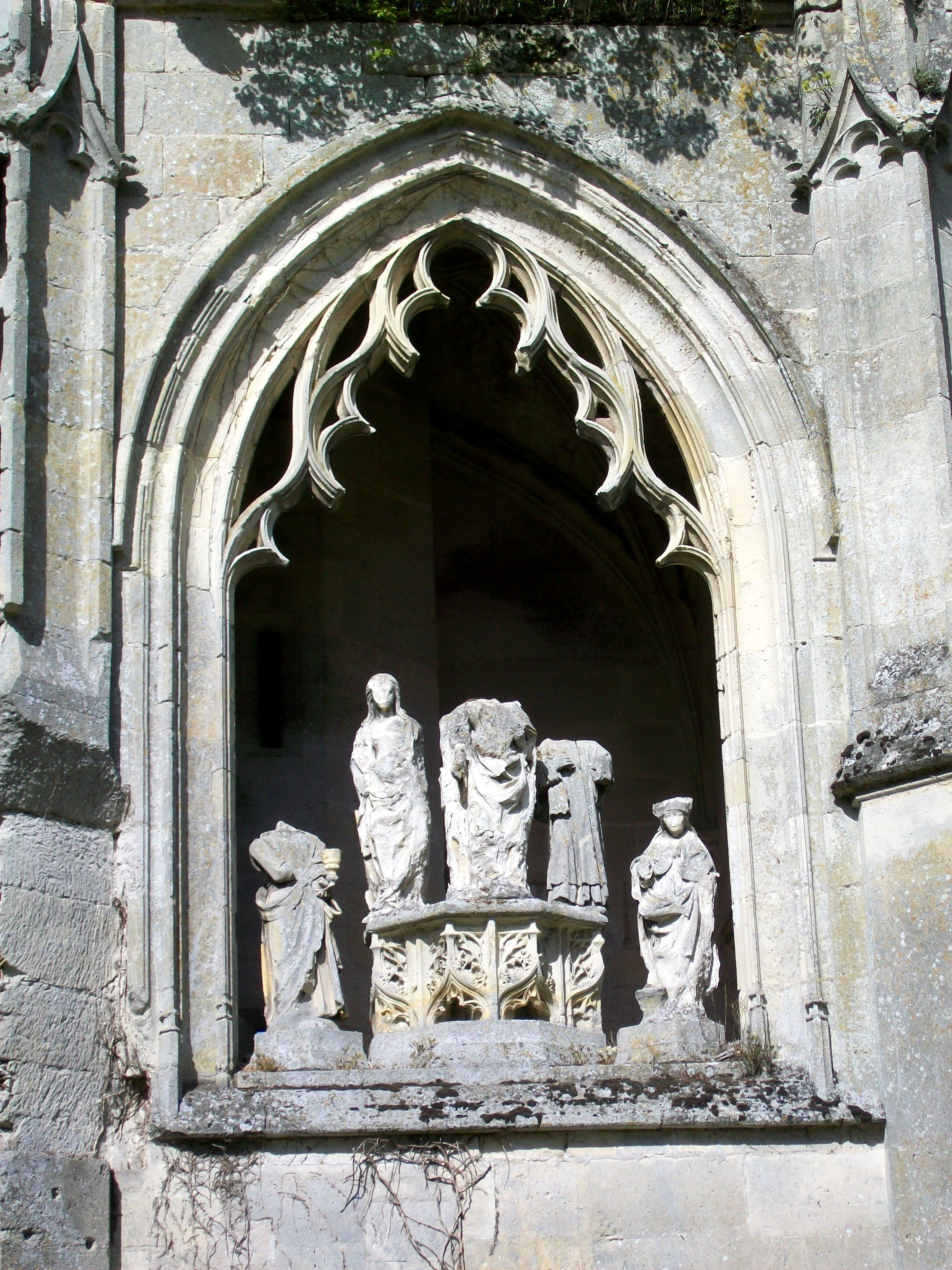 Abbaye de la Victoire à Senlis (Oise) ; cinq statues de saints, dont saint Jean et saint Nicolas, et le fragment d'un tombeau dans une fenêtre de l'abbatiale ruinée.